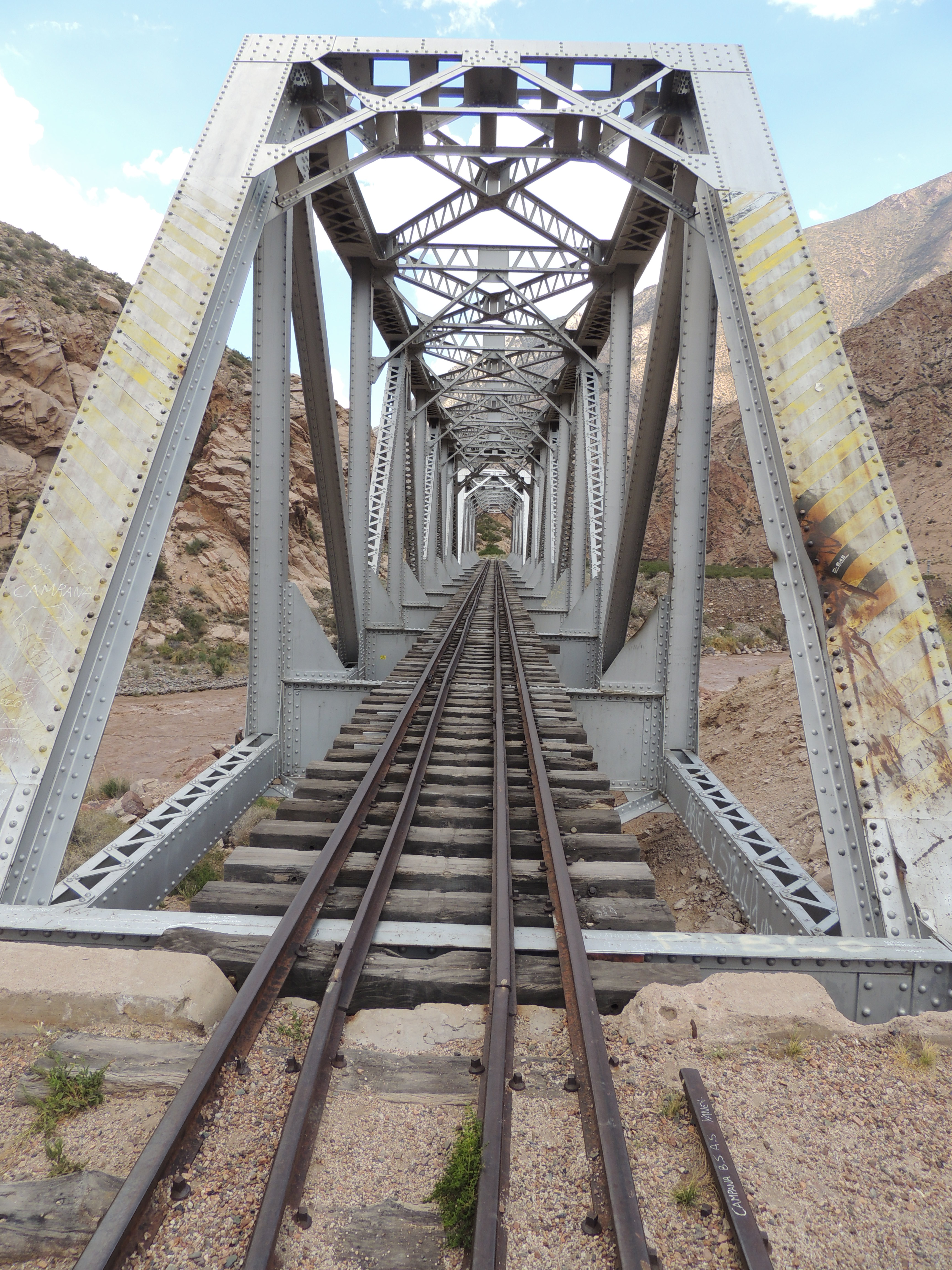 En la foto puente del Ferrocarril Trasandino Central sobre el río Mendoza a unos 20 Km al oeste de Potrerillos